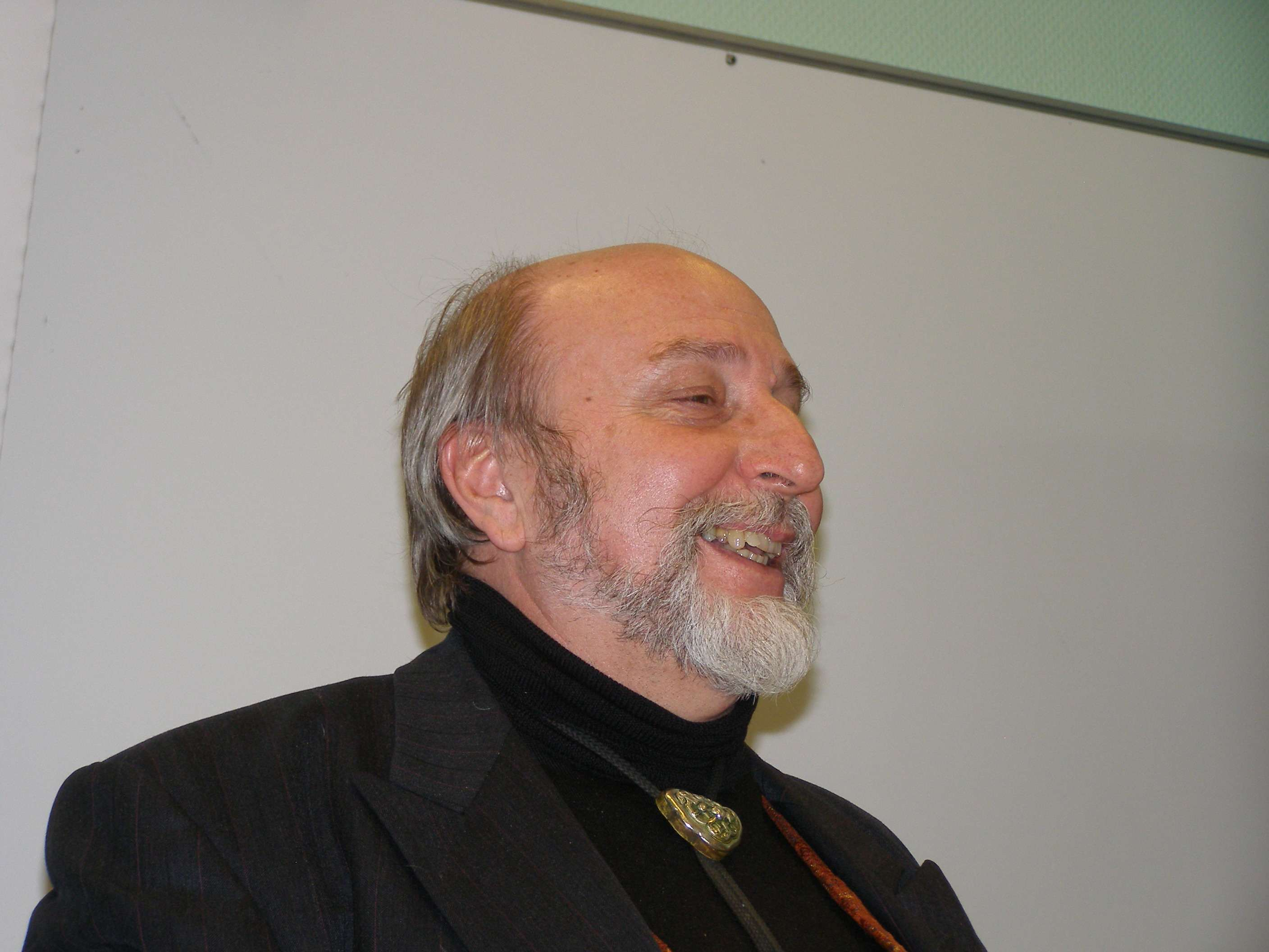 Mihály Hoppál Tartus TÜ semiootika osakonnas loengut pidamas.